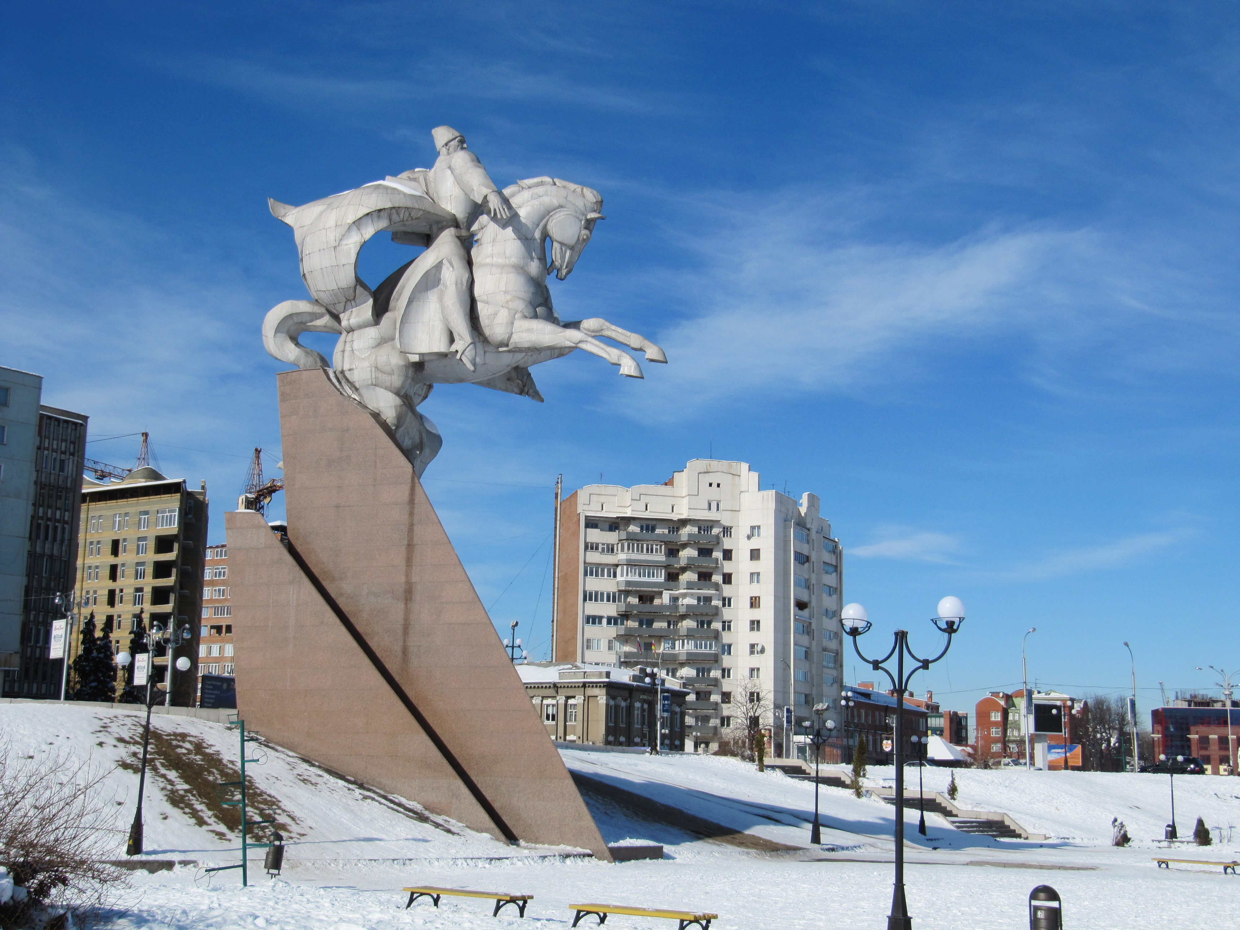 Памятник Плиеву, Владикавказ